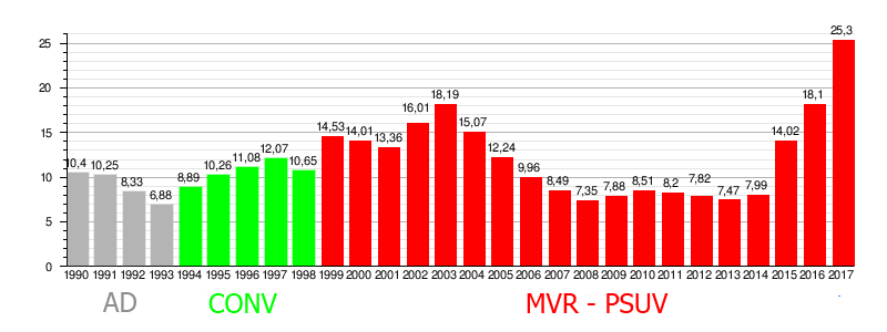 Unipartidismo en Venezuela y desmpleo entre los años 1990 y 2017